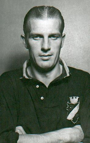 Börje Leander